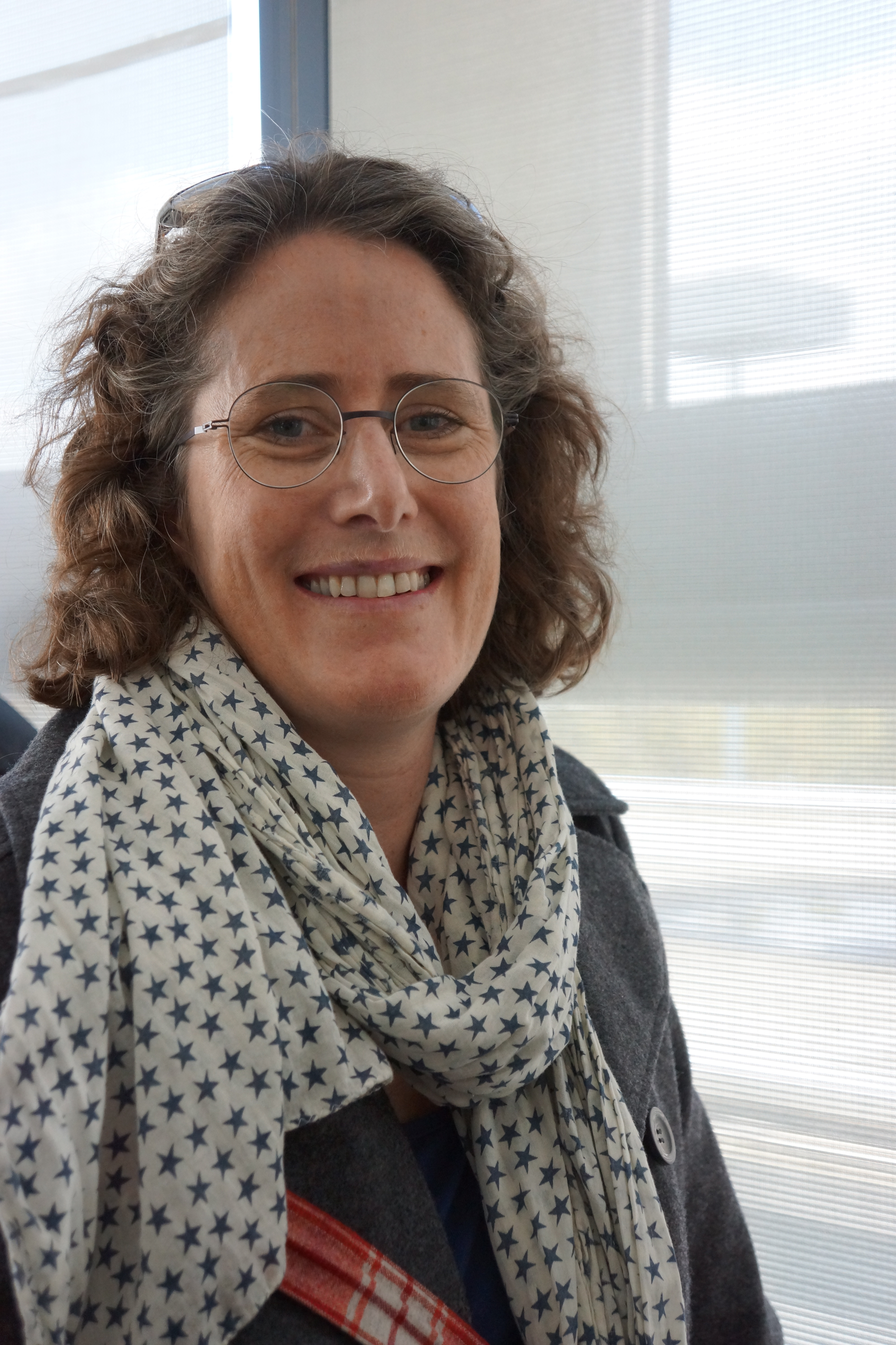 Kate Camp